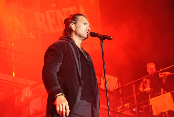 Ricardo Arjona en Argentina Tour 5to Piso